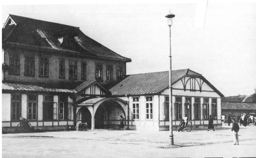 南満州鉄道安東驛の駅舎